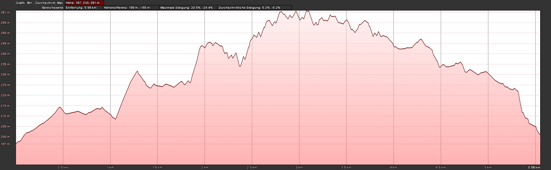 Höhenprofil der Laufstrecke beim Lousberglauf Die Daten wurden mittels Google Earth gewonnen. X-Achse: Strecke / Y-Achse: Höhe über NN